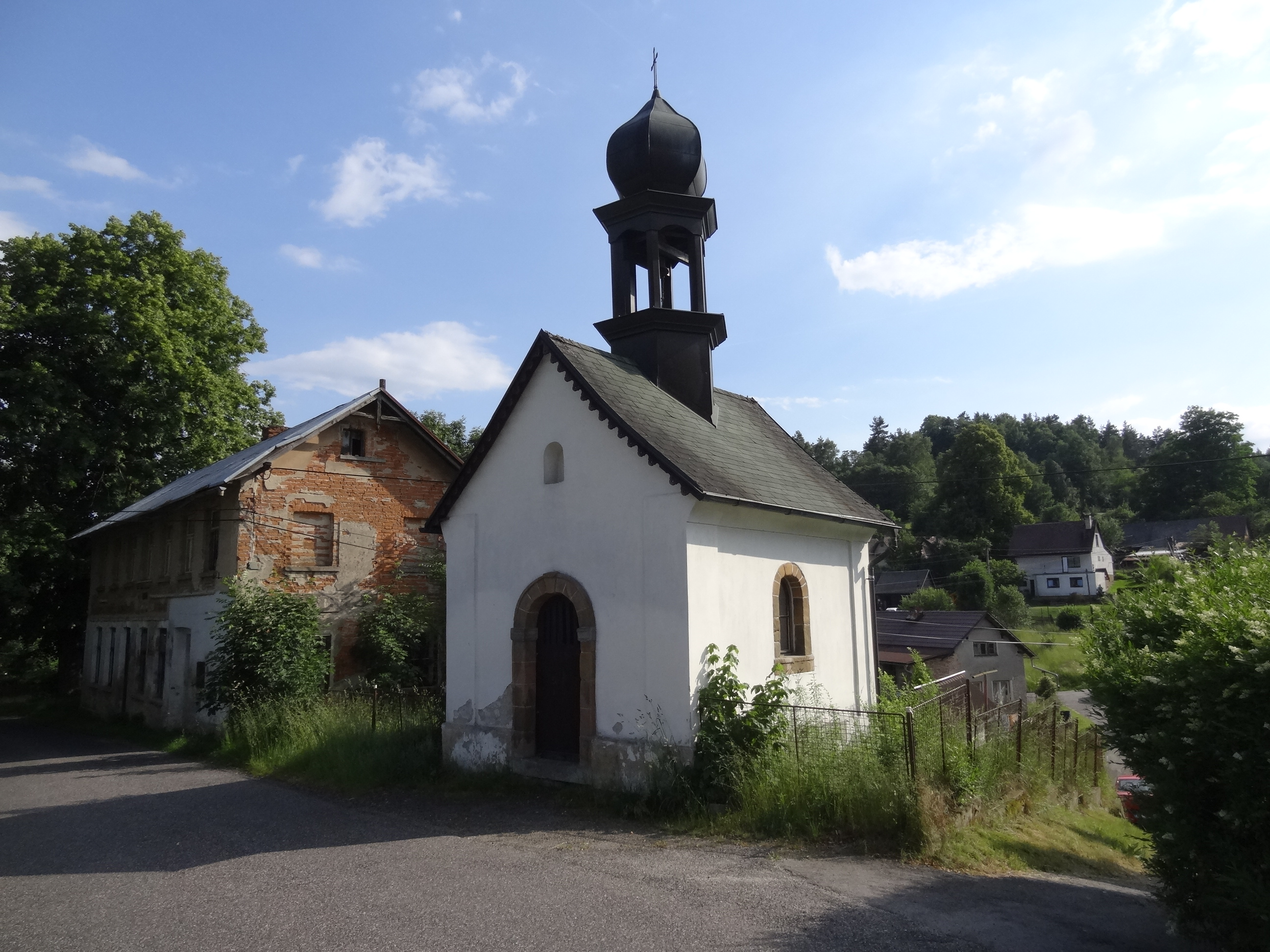 Smržov (u Českého Dubu) - kaplička